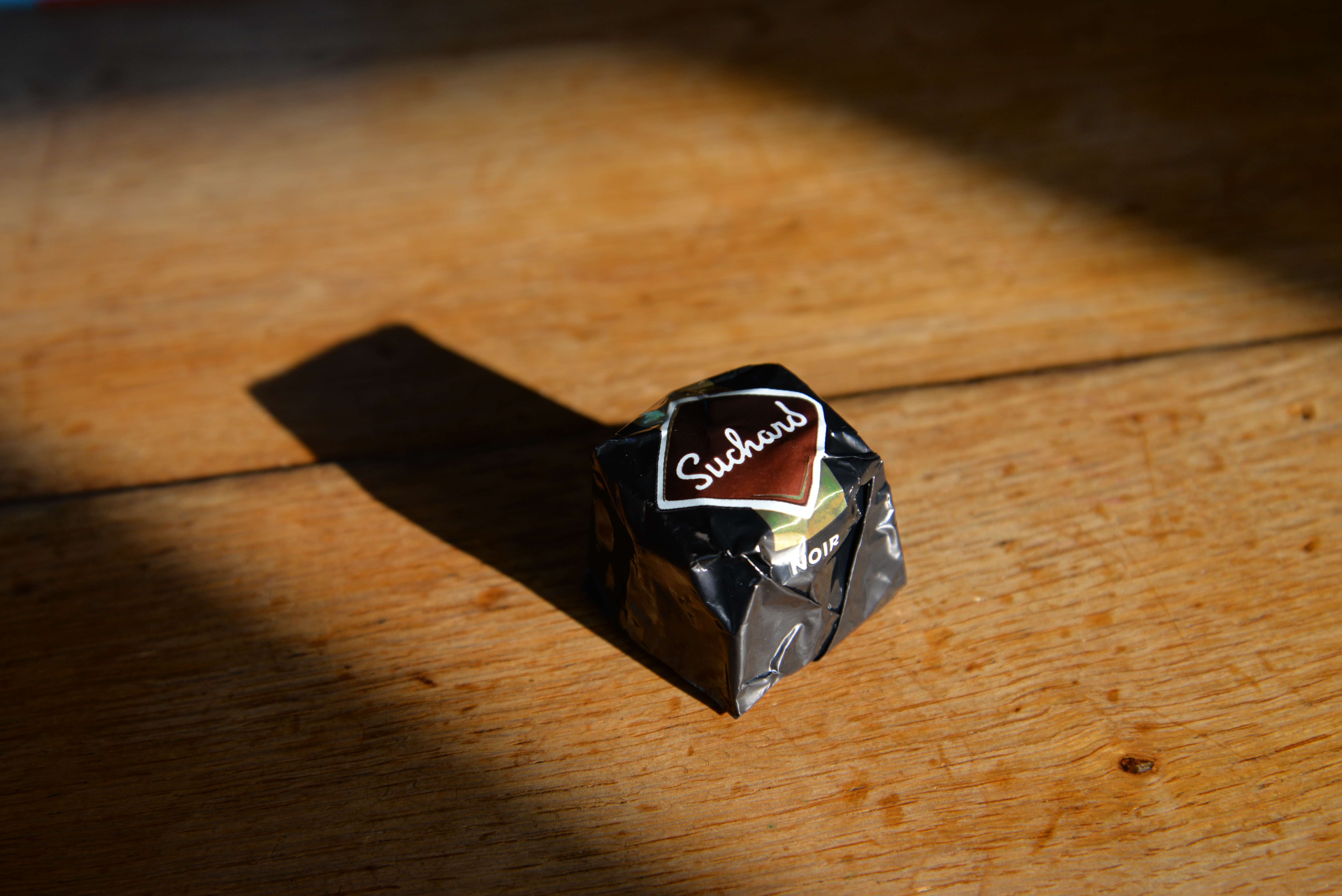 Le rocher de chocolat noir de marque Suchard.